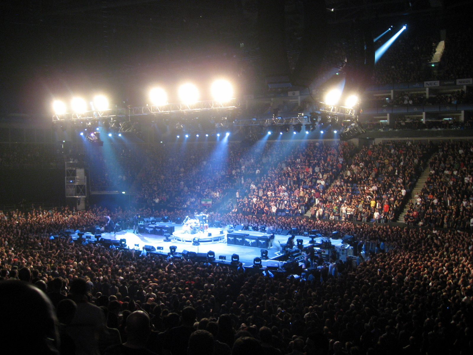 Metallica